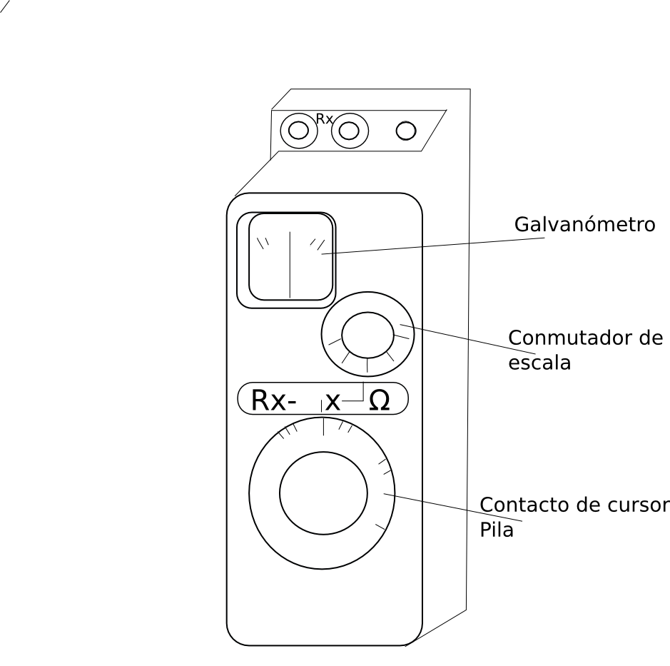 Aspecto de un puente de medición de resistencias